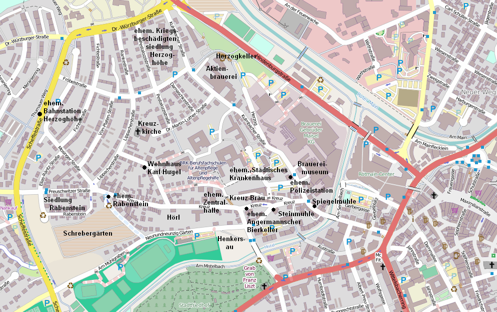 Stadtteil Kreuz linkd der Innenstadt von Bayreuth (using OpenStreetMap)